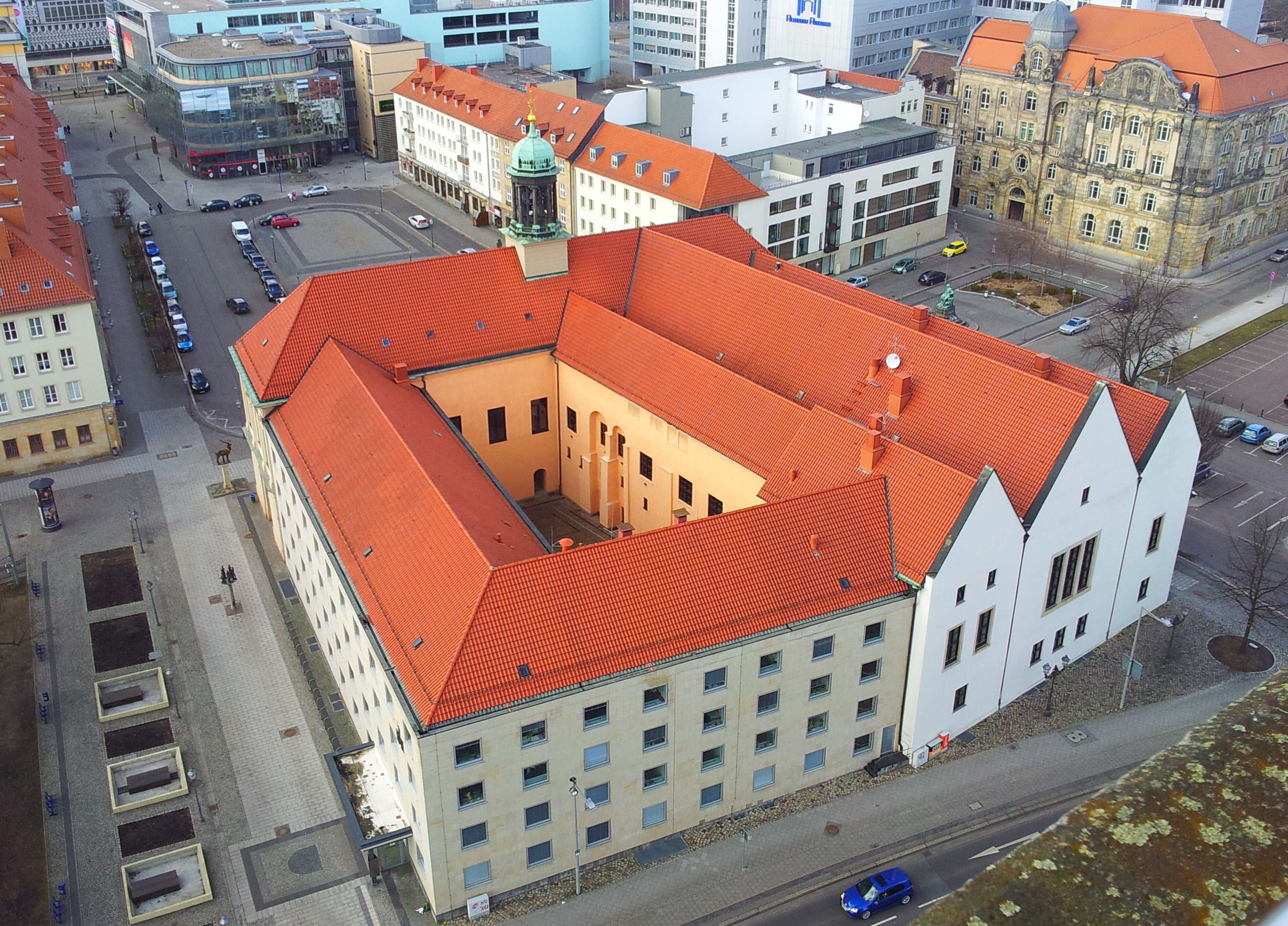 Rückseite des Alten Rathauses in Magdeburg